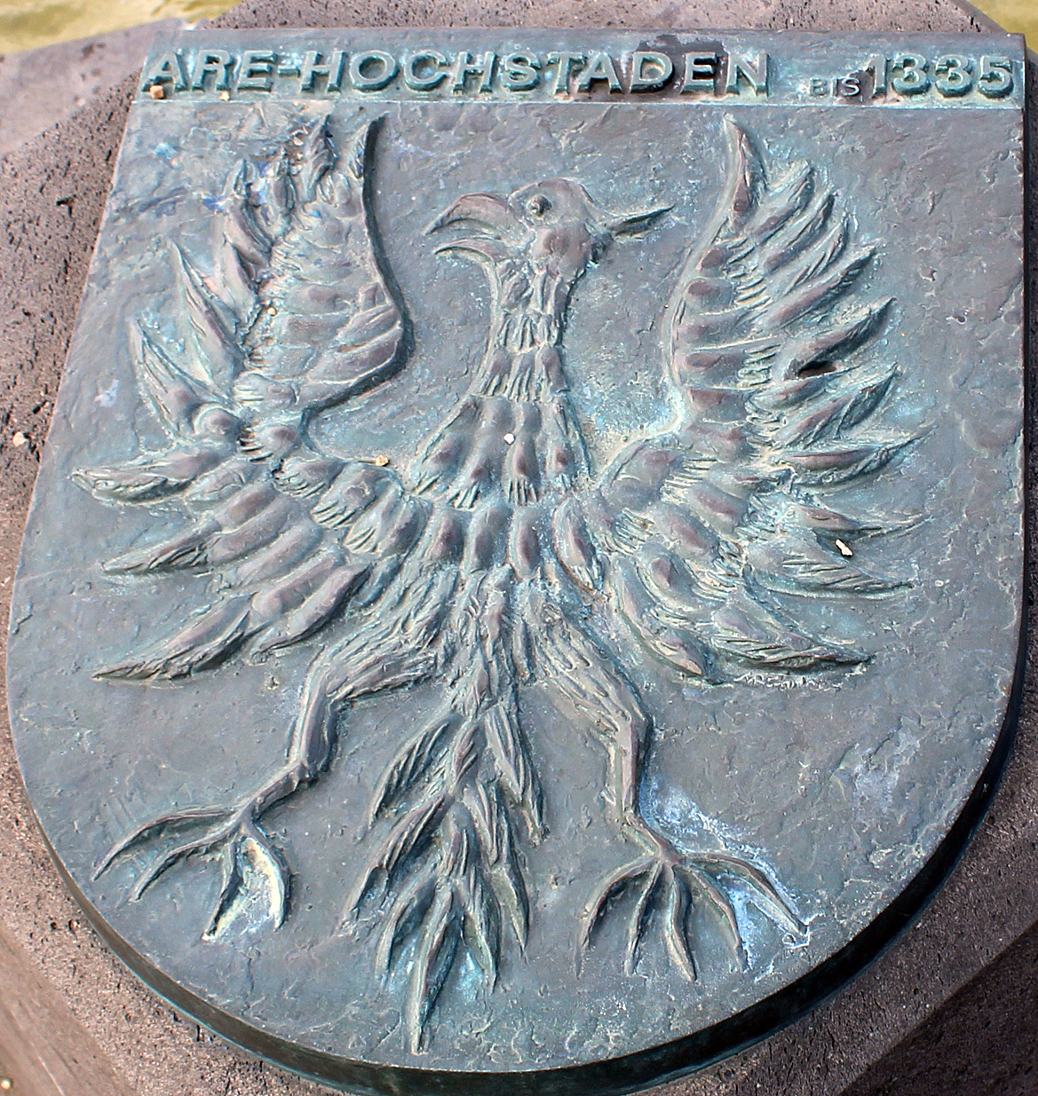 Wappen von Are Hochstaden am Brunnen im Wirtschaftshof von Schloss Wickrath